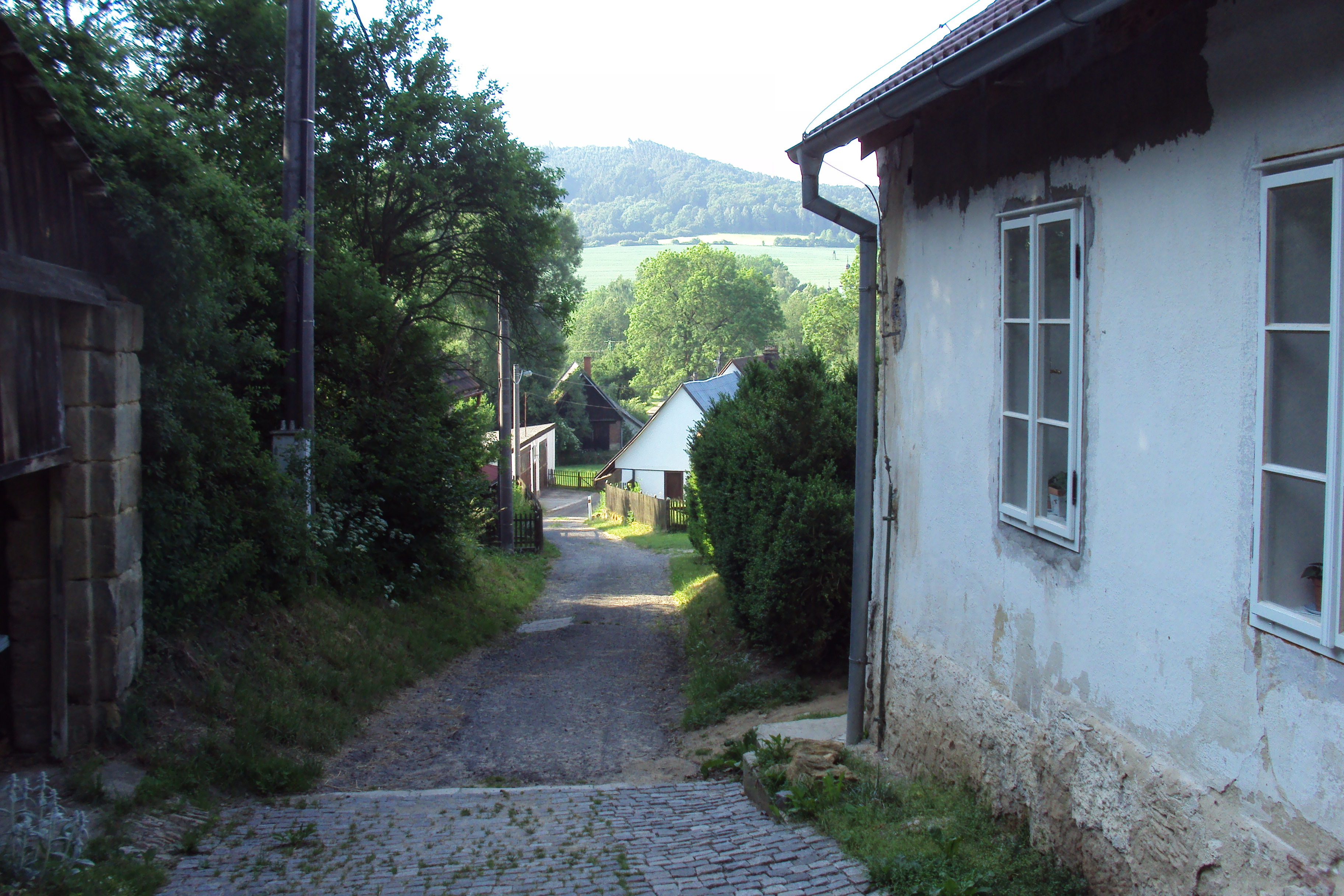 Osada Malá Strana 250 metrů od obce Deštná (ta je dole) na Kokořínsku